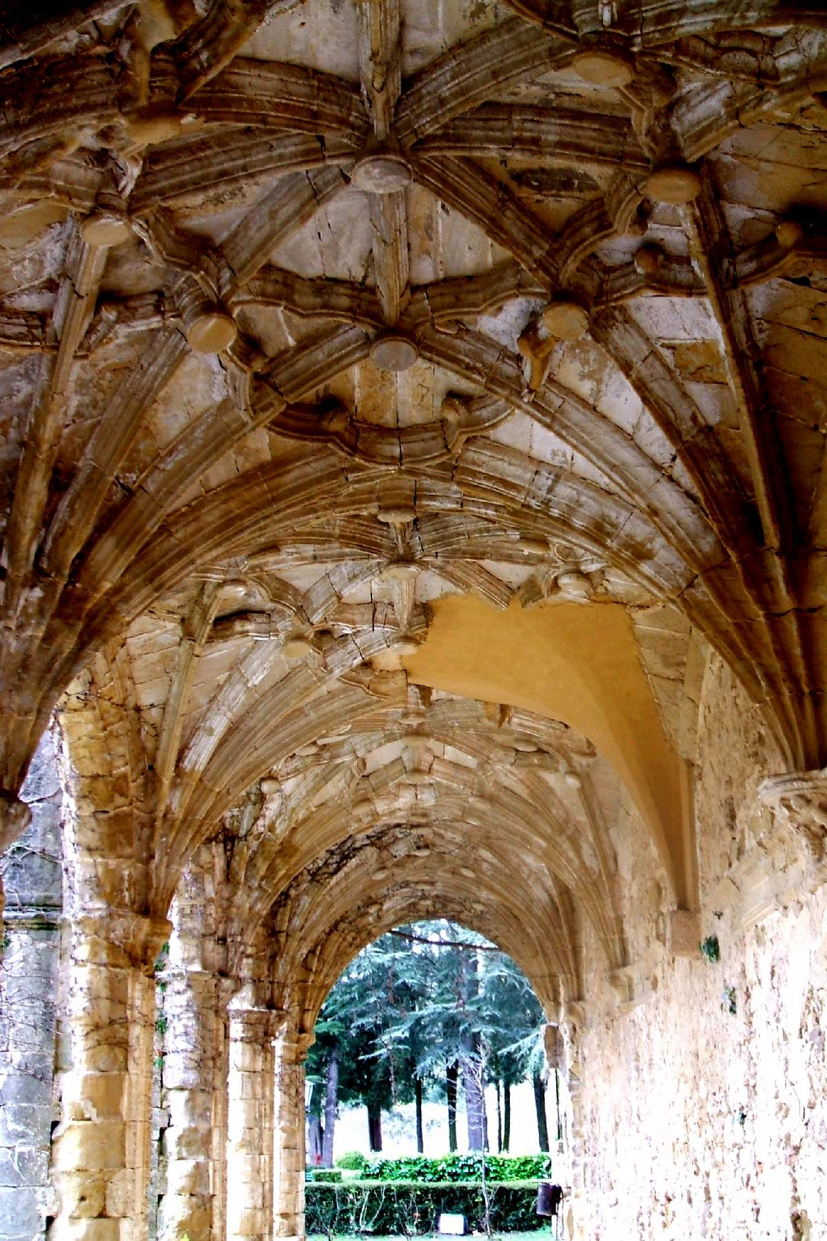 Restos del claustro del antiguo monasterio jerónimo de San Miguel del Monte, en el término municipal de Miranda de Ebro (Burgos, Castilla y León, España)